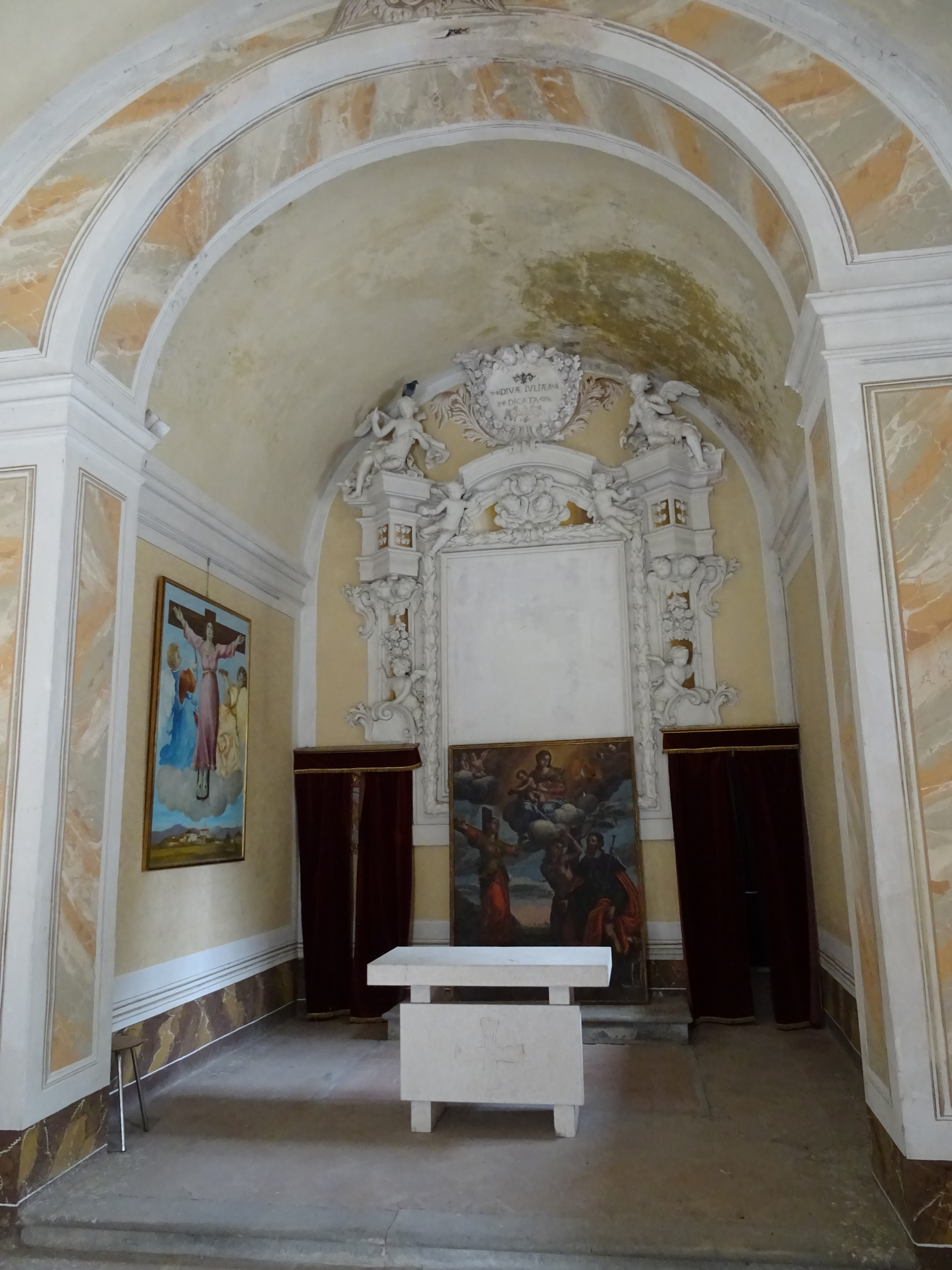 chiesa di santa Giulia a Cazzago San Martino